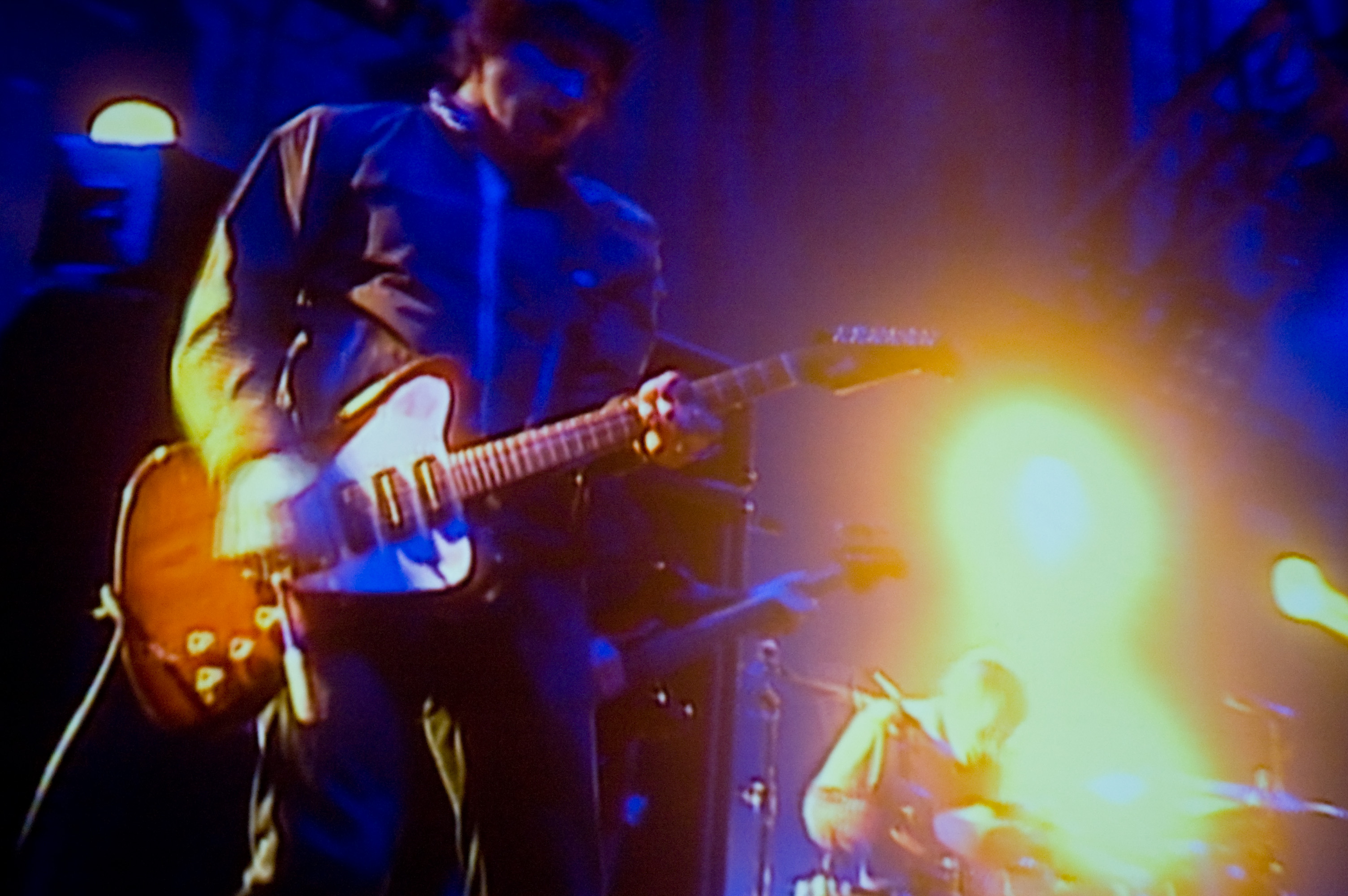 Gem Archer and Zak Starkey.